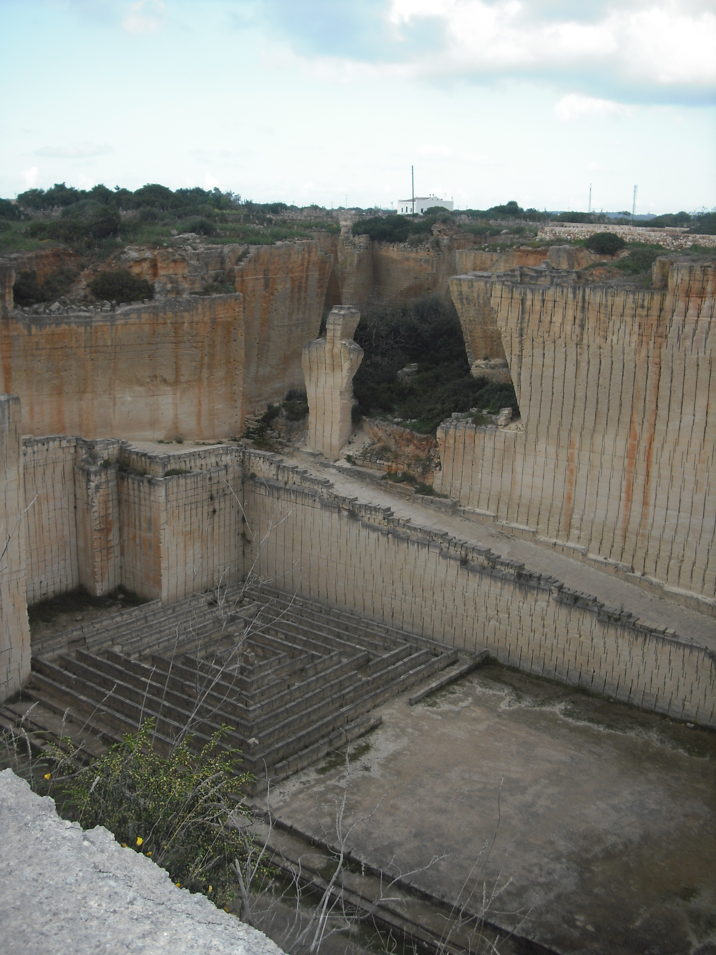 Lithica